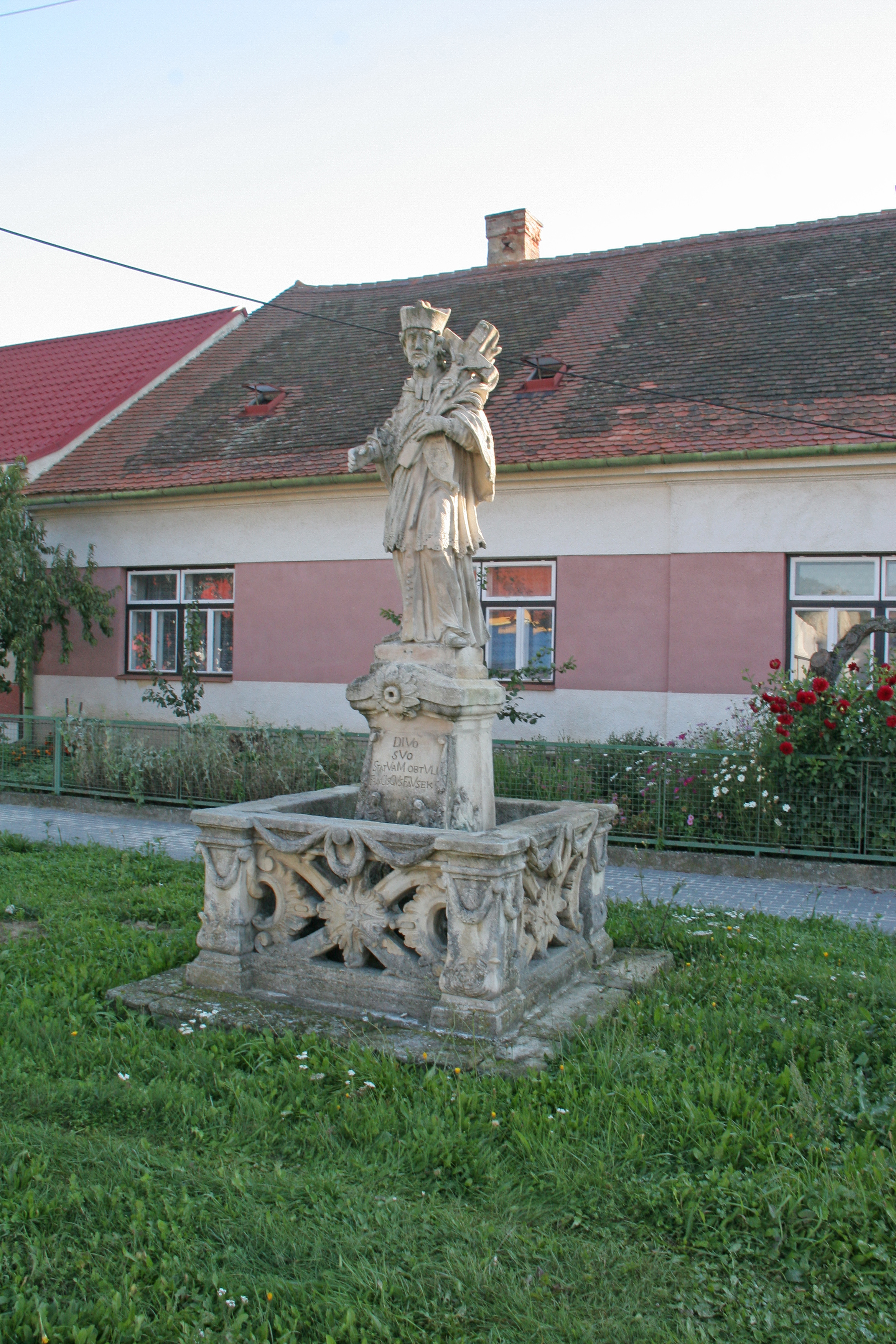 Socha svatého Jana Nepomuckého, náves, Citonice.